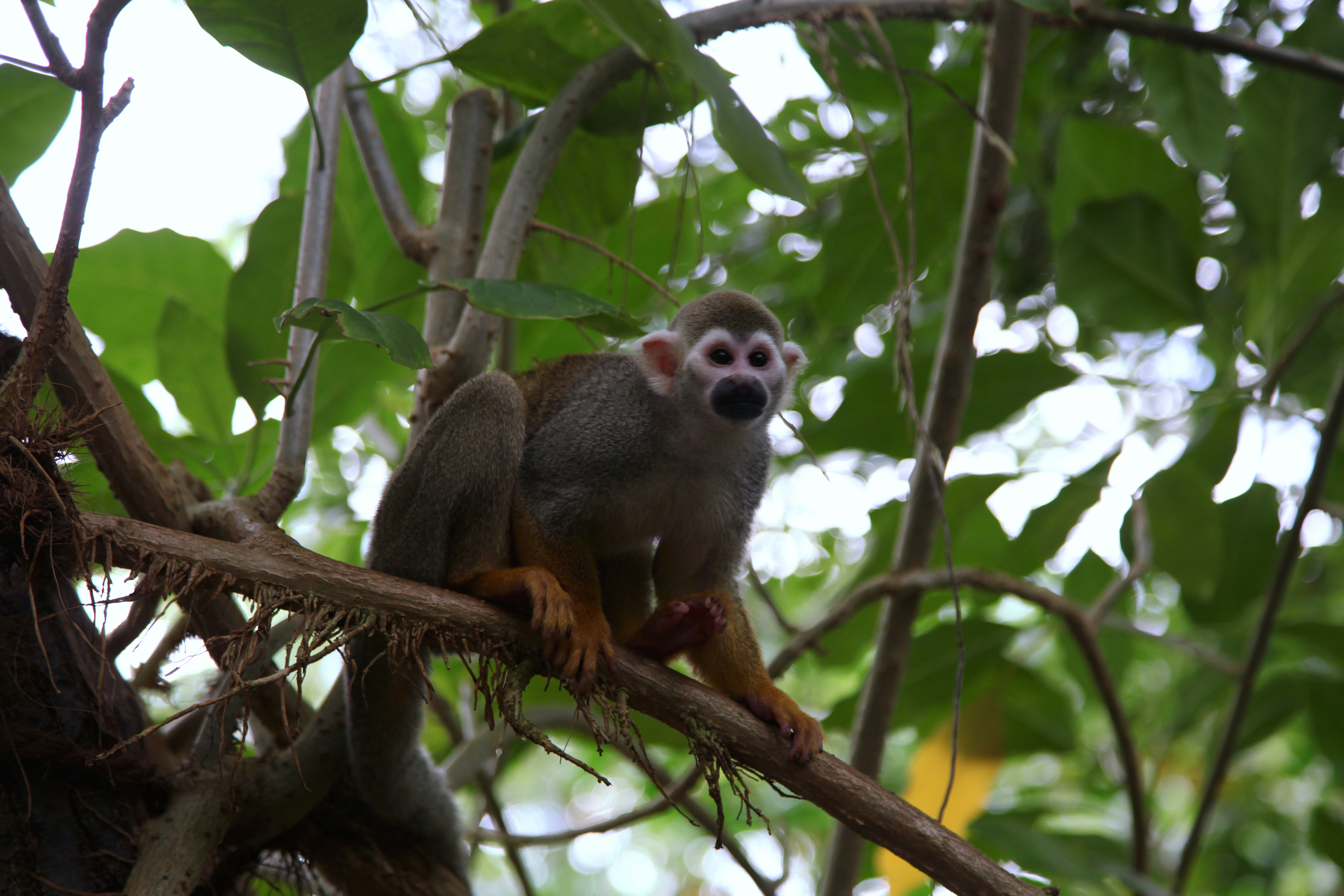 Gondwanaland im Zoo von Leipzig